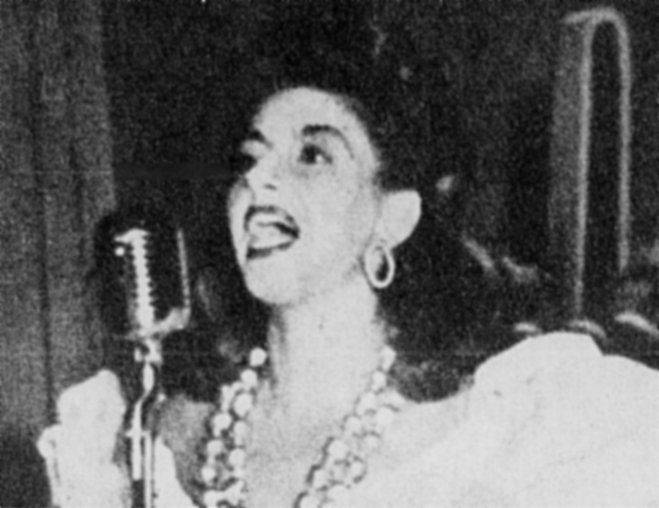 A atriz, cantora e vedete brasileira Elvira Pagã, em fotografia publicada em 1944 pela revista "Carioca".